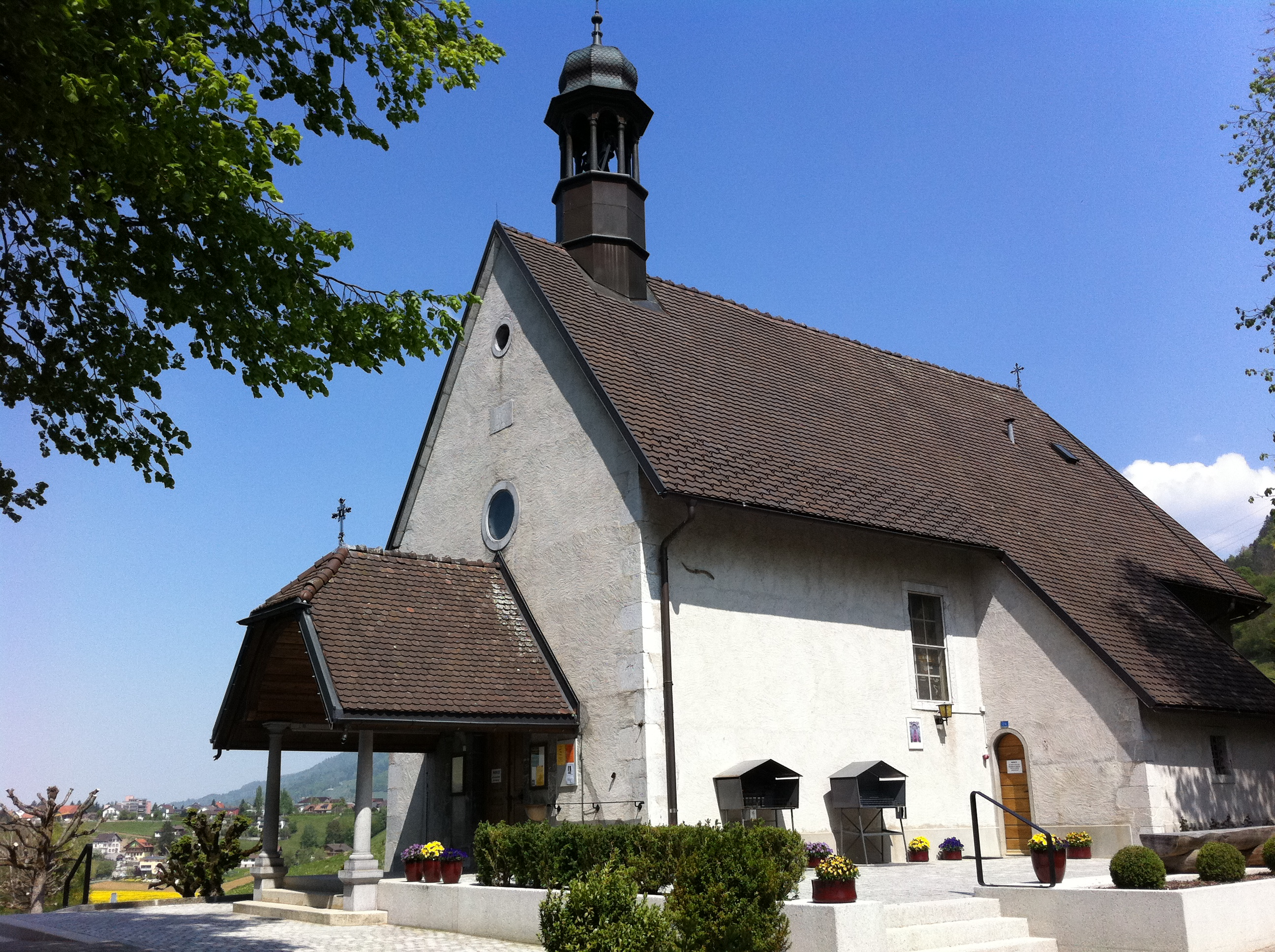 Église Notre-Dame des Marches, Broc, canton de Fribourg, Suisse